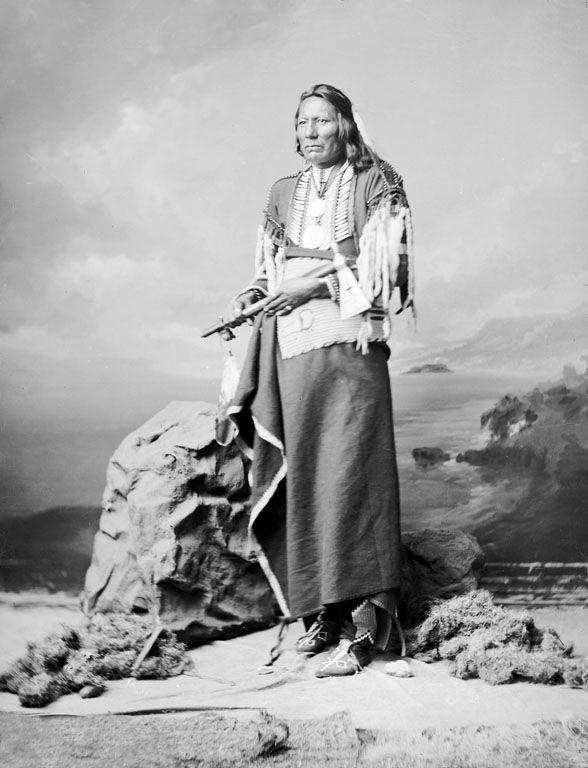 White Eagle, chef Ponca-1877